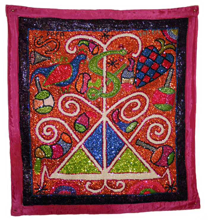 Voodoo banner by Valris.